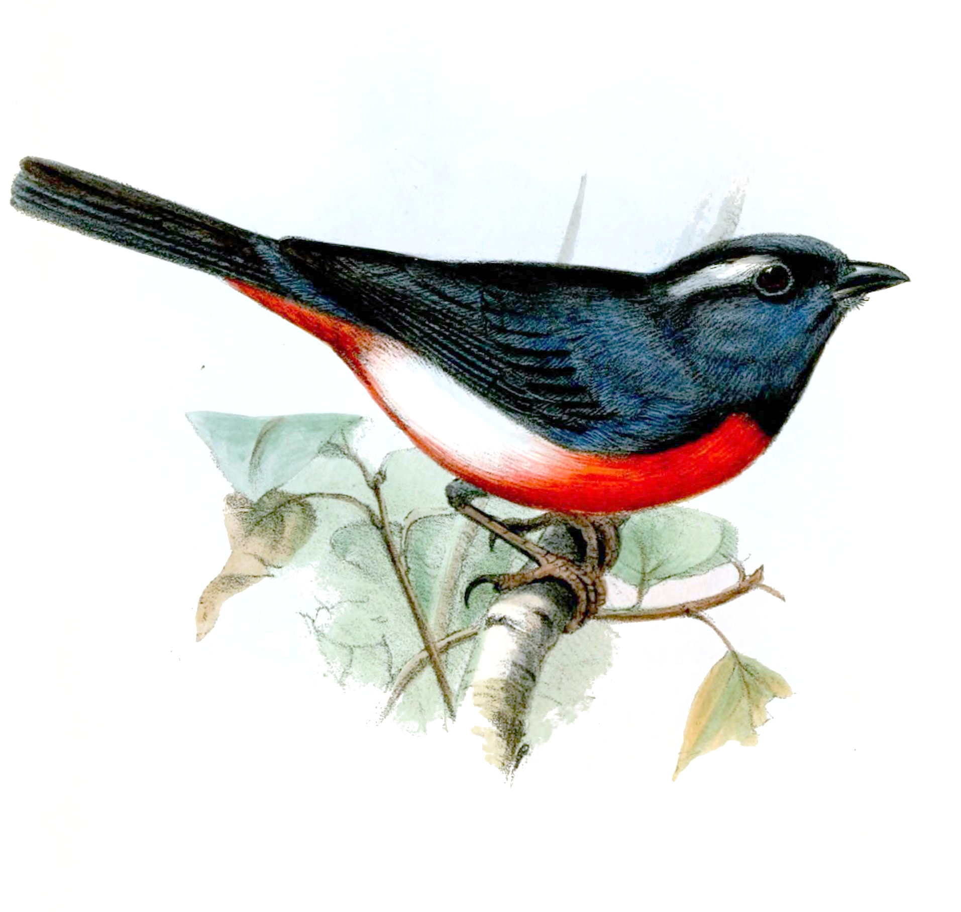 Granatellus sallaei